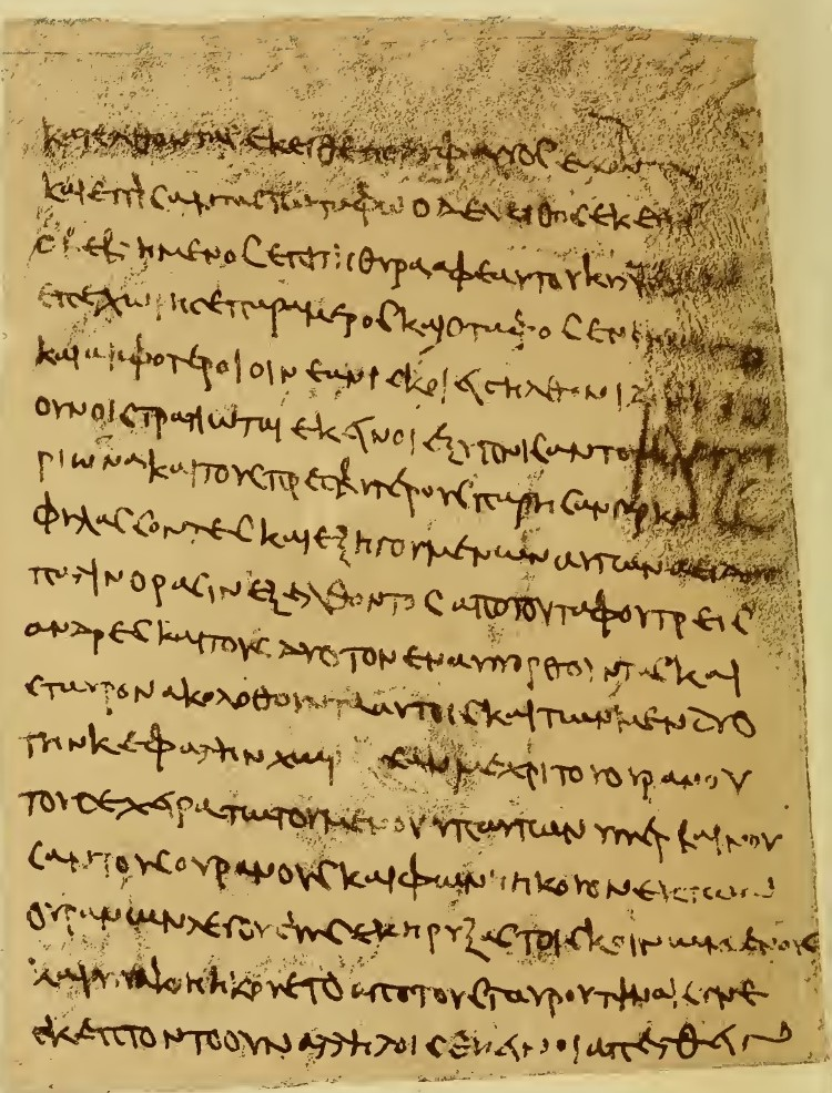 Eine Seite des Fragments von Akhmim in Griechisch (Petrusevangelium)